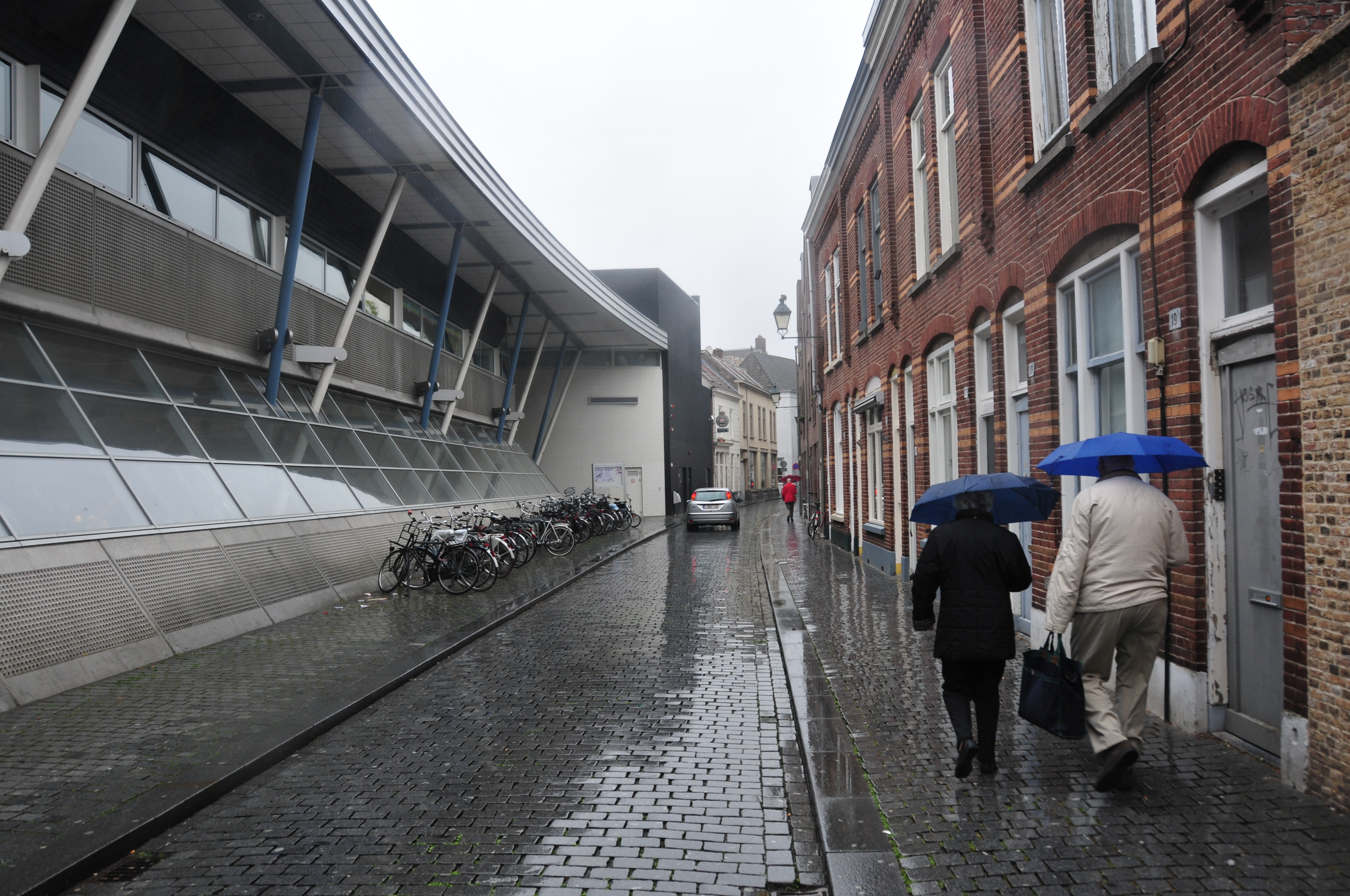 Zicht op de hoofdvestiging van de Bibliotheek Breda in de Molenstraat